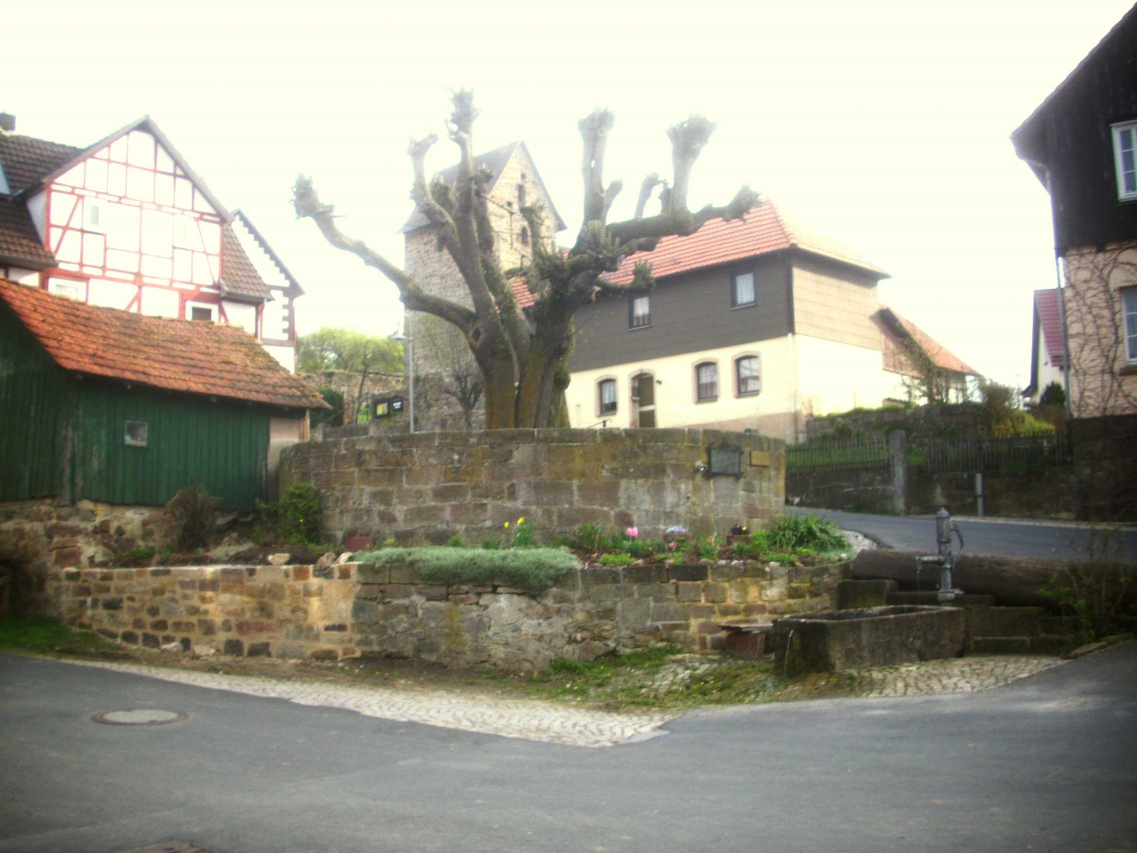 Retterode – (Kreis Werra-Meissner; Bundesland Hessen); Retterode-Ansicht von Südwesten mit Gerichtsplatz (Steinring mit Linde von 1750) im Vorfeld und Kirche-03052013